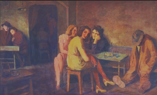 “Kafe-etxea”, Jazinto Olabe